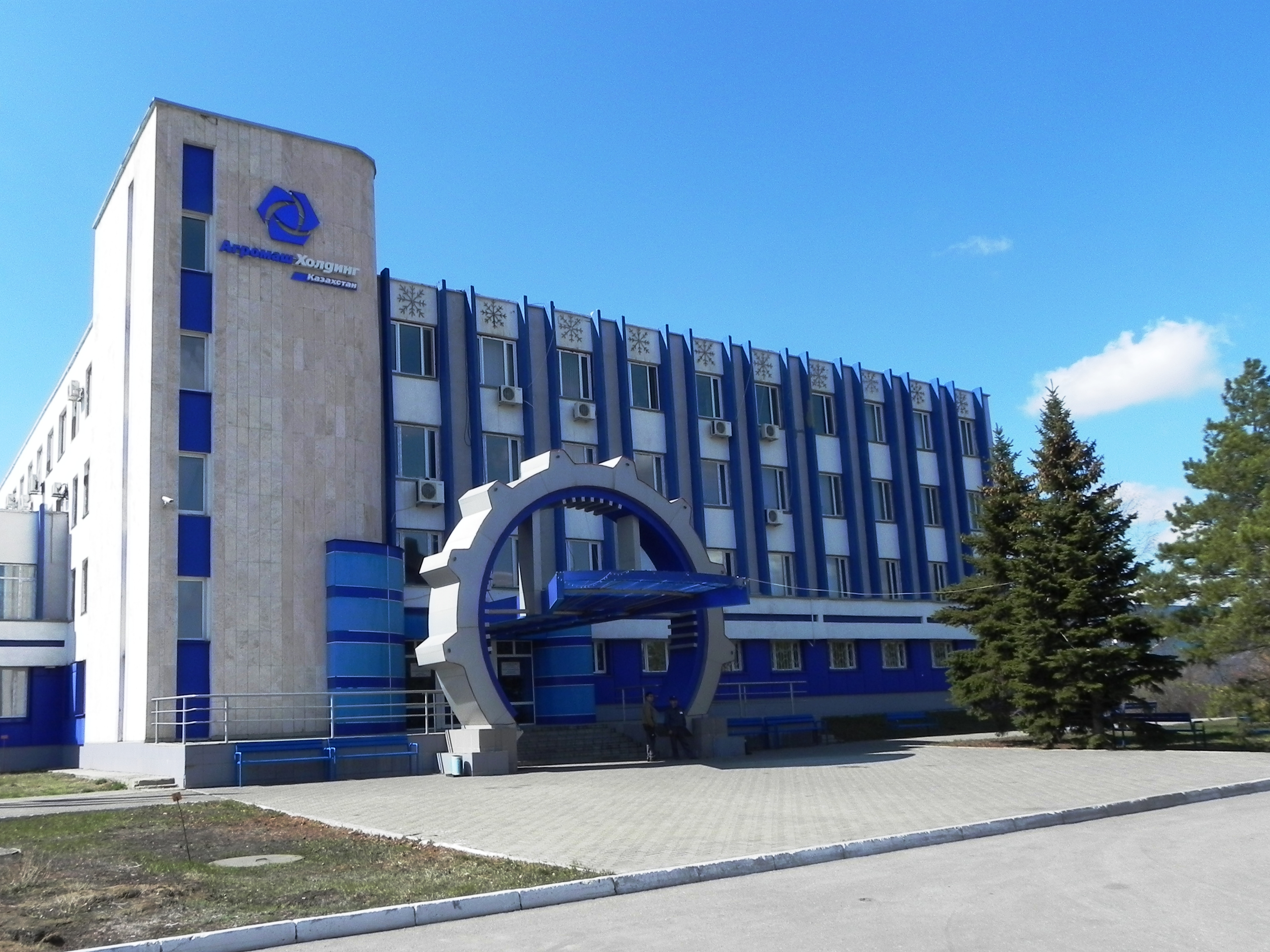 Административный корпус АО АгромашХолдинг